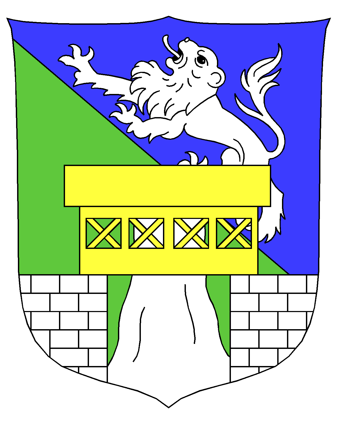 Das Gemeindewappen von Reckingen-Gluringen